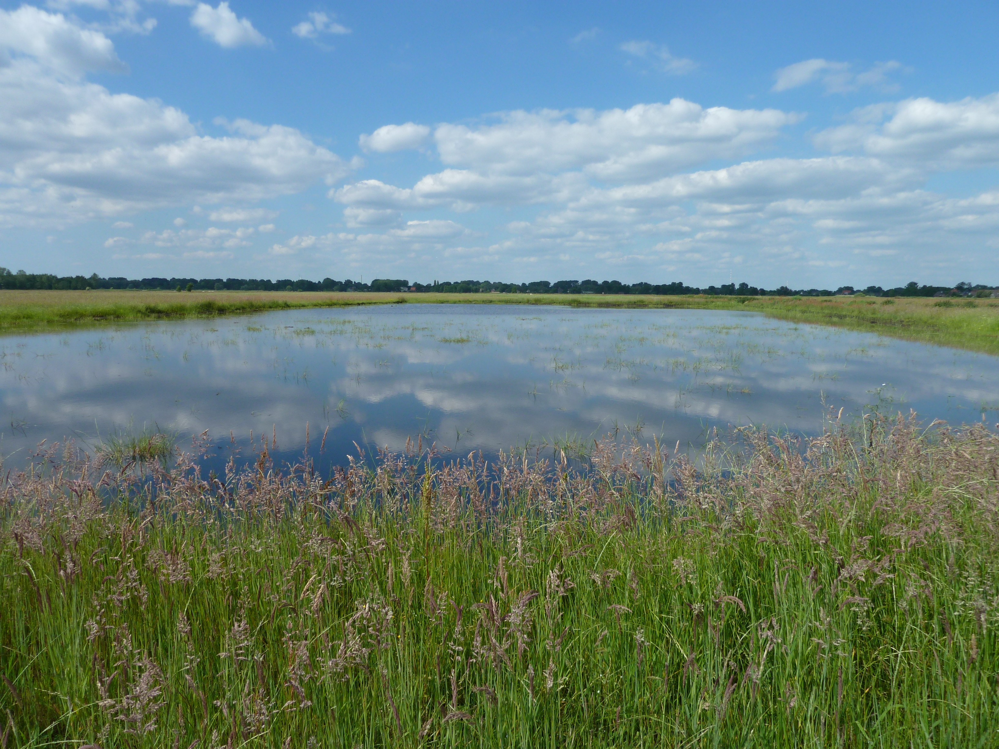 2008/2009 neu angelegte Flachwasserzone (Blänke) in der zweiten Vegetationsperiode